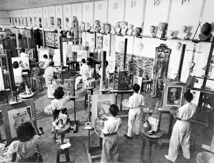 Studio gambar "Balai Pendidikan Universiter Guru Seni Rupa" (studi 3 tahun) yang dikelola Fakultas Ilmu Pengetahuan Teknik Universitas Indonesia di Bandung - sekarang Fakultas Seni Rupa dan Desain Institut Teknologi Bandung. Program ini kemudian ditingkatkan menjadi program sarjana 5 tahun.